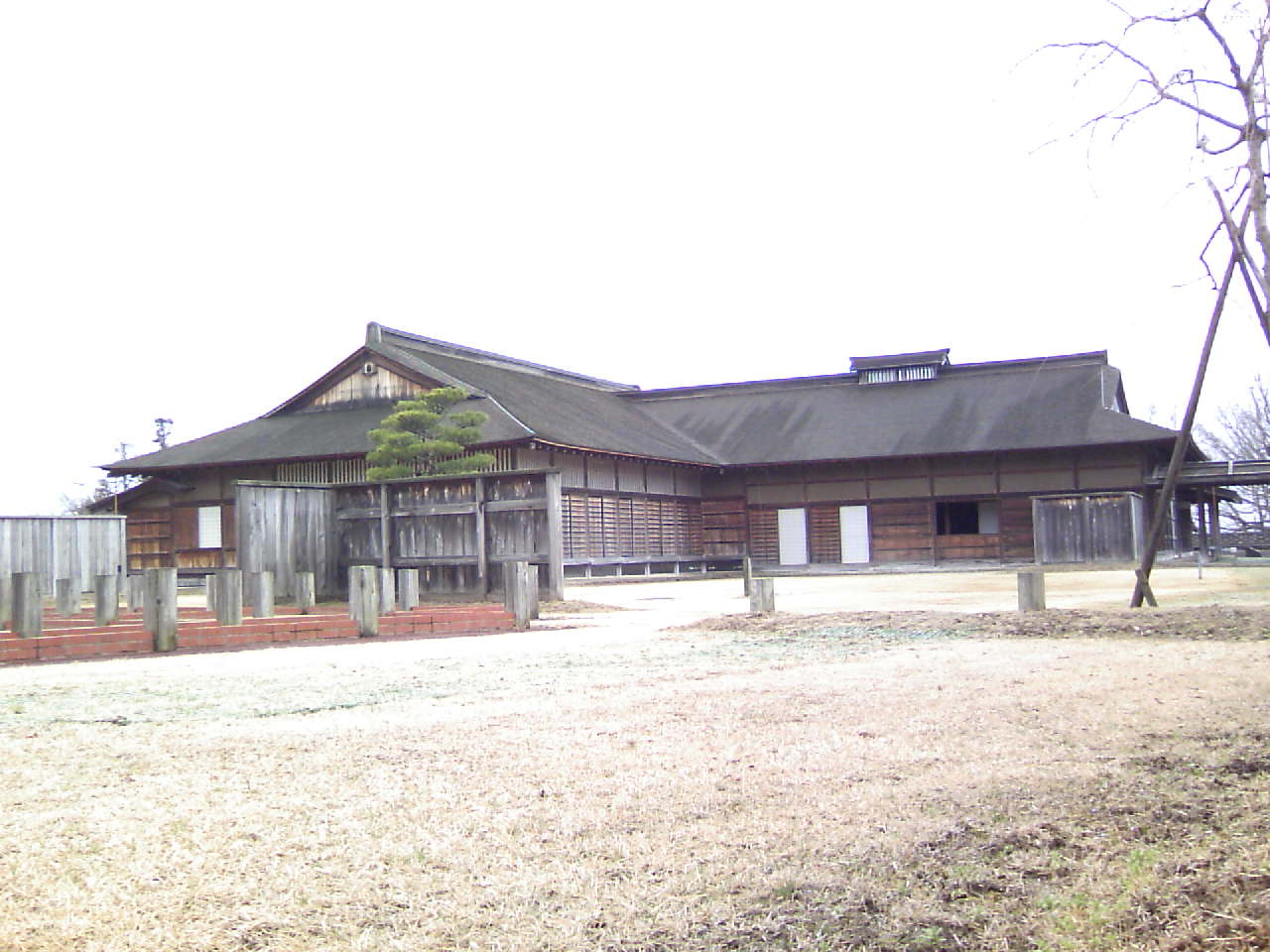 根城「本丸・主殿」（史跡根城の広場） (NE-JO CASTLE / HONMARU SYUDEN - HACHINOHE, AOMORI, JAPAN)